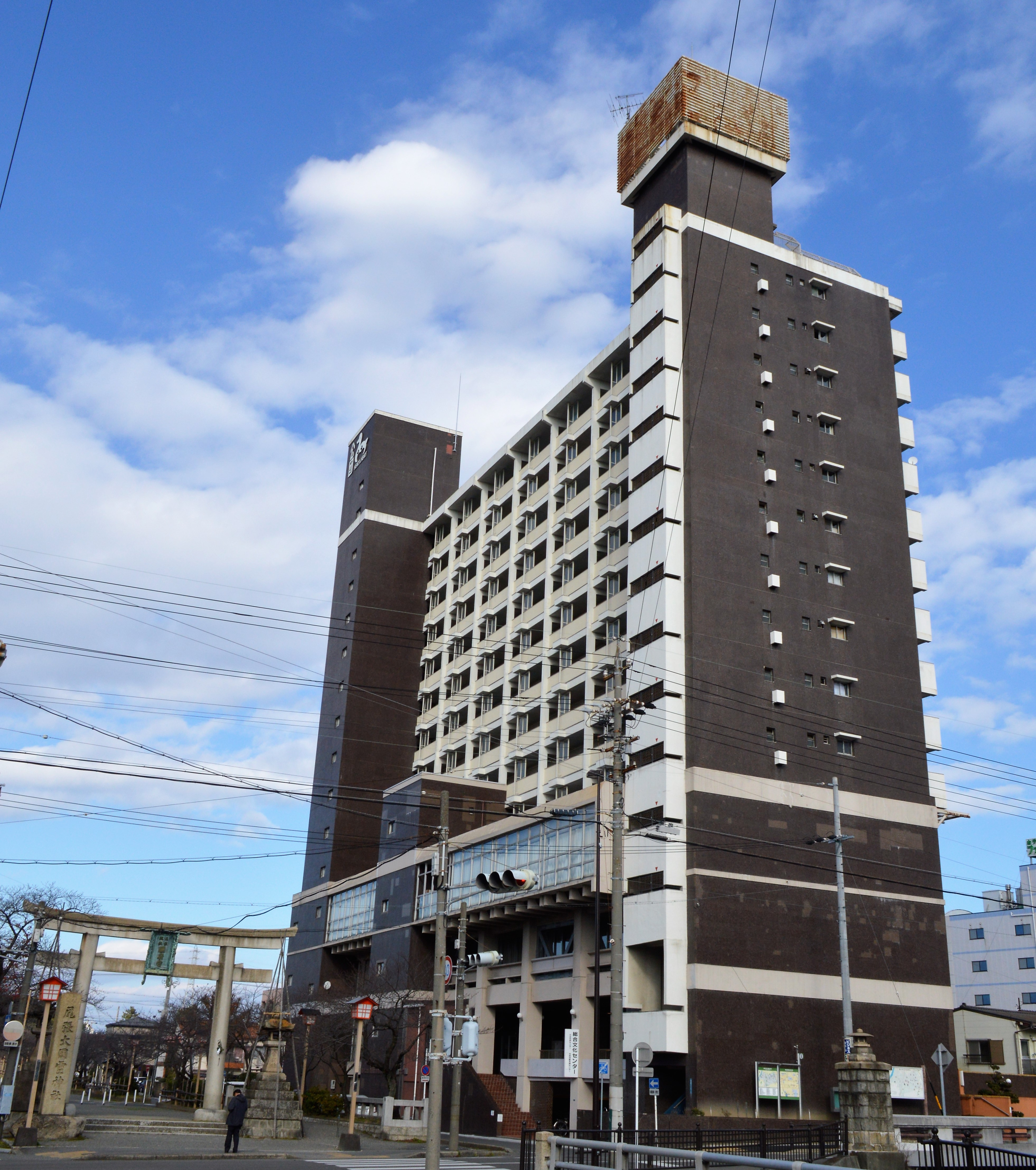 稲沢市にあるUR都市機構国府宮住宅。下層階は図書館・稲沢市役所北出張所・ホール・文化協会・美術協会などを併せ持つ稲沢市総合文化センターである。53m。